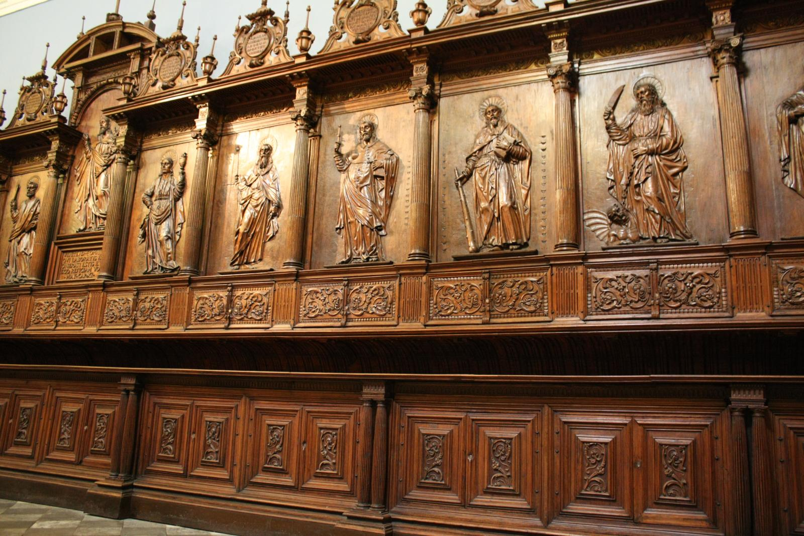 Cajonería de la Sacristía de la Catedral de Lima. Ejecutada por el escultor Juan Martínez de Arrona.